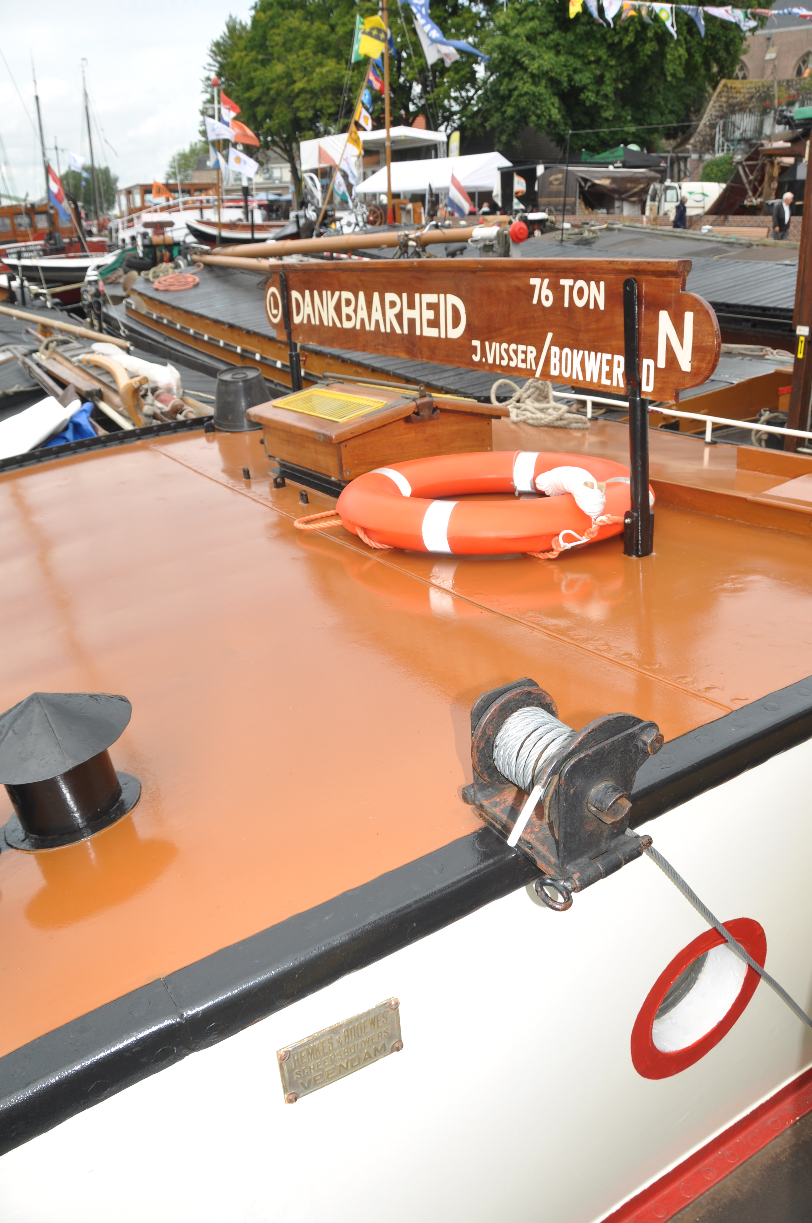 De DANKBAARHEID in Hasselt.